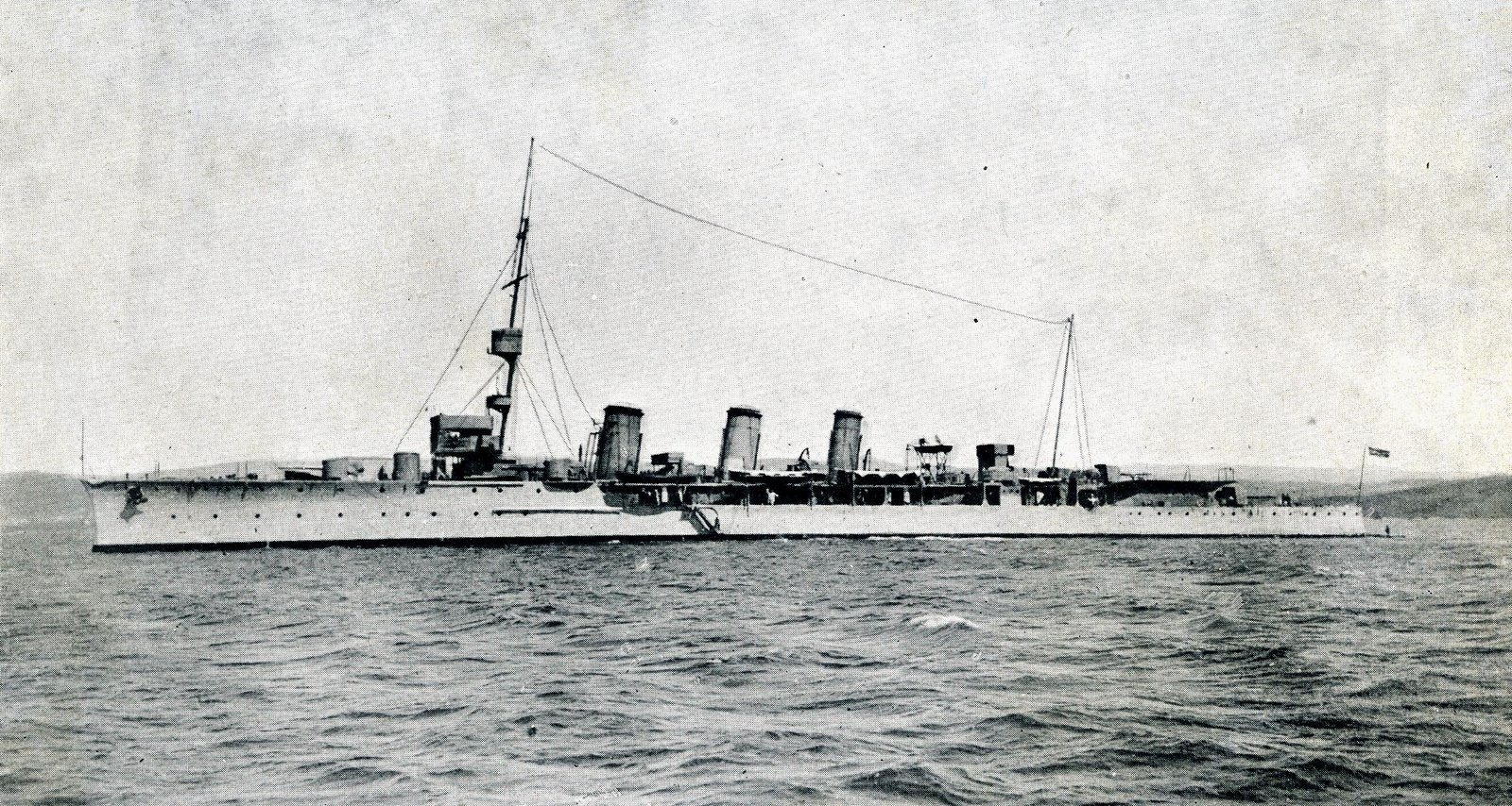 Crucero rápido "Blas de Lezo" en sus pruebas de mar 1923